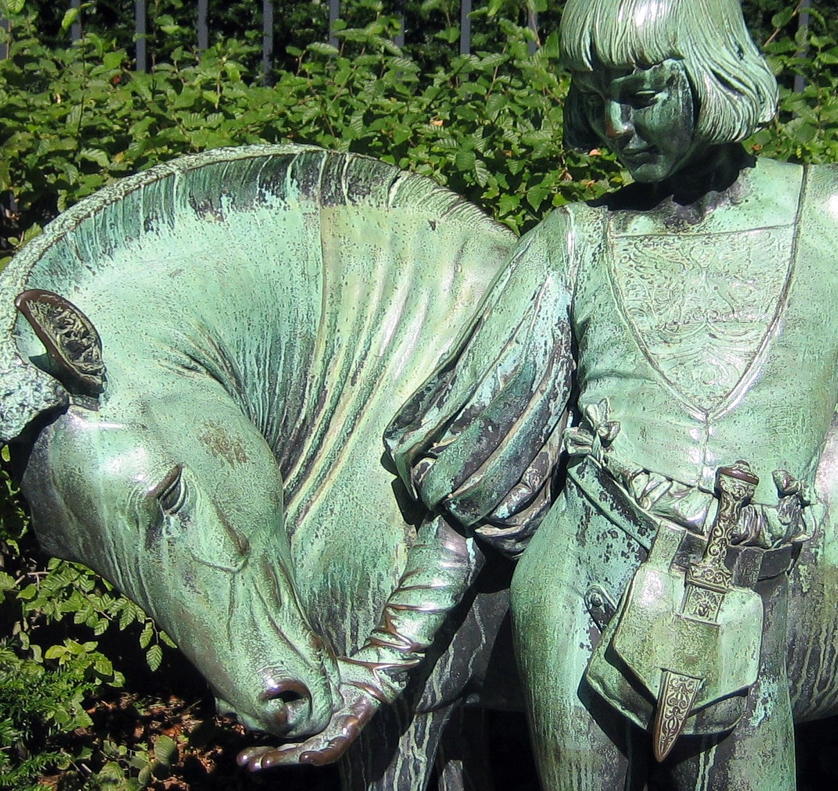 Bronzeplastik "Pony und Knappe" des deutschen Bildhauers Erdmann Encke (1843-1896), datiert 1896. Aufstellungsort: Der "Englische Garten" im Großen Tiergarten in Berlin (früher Schlosspark Bellevue). Teilansicht.